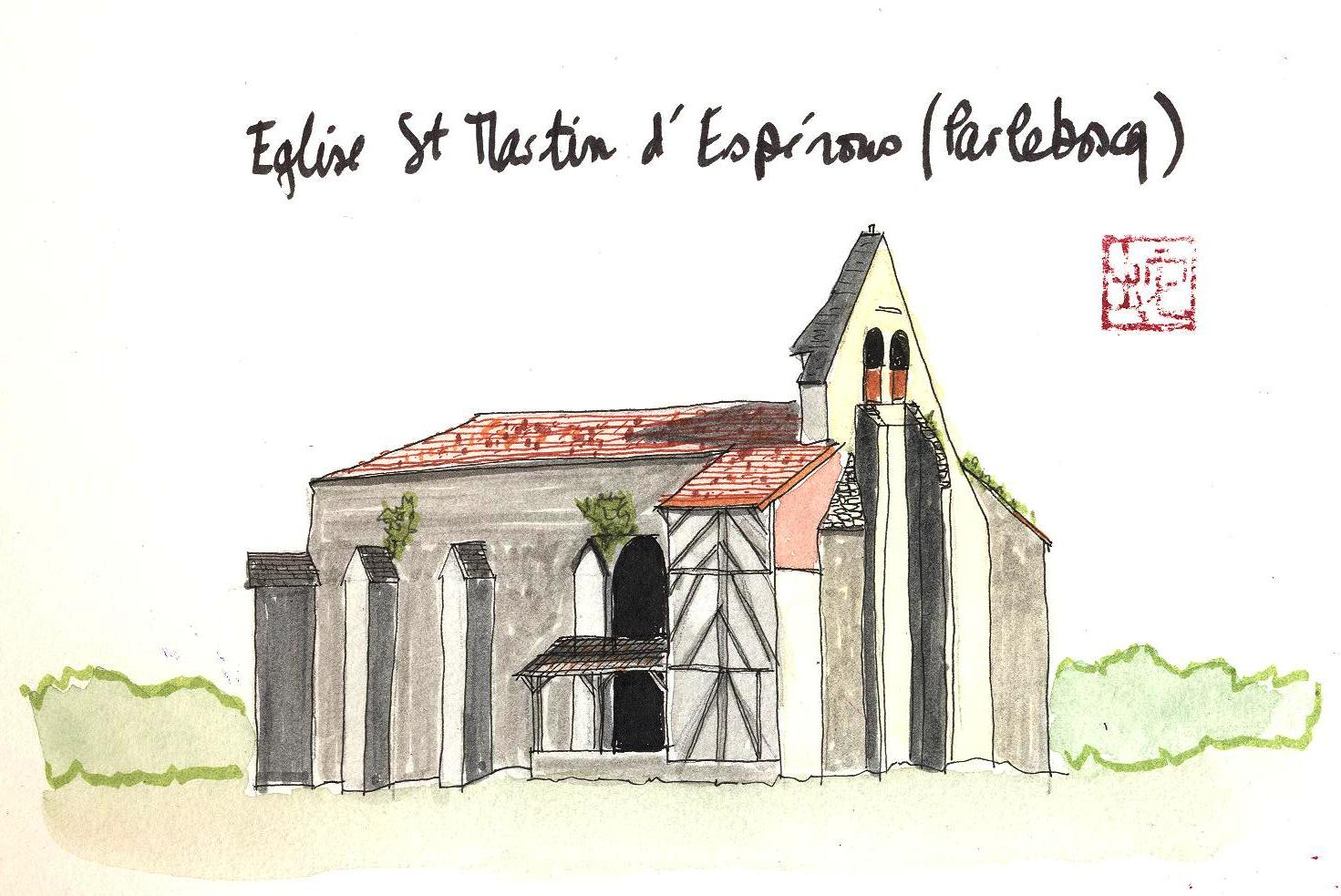 Aquarelle de l'église Saint-Martin d'Espérous à Parleboscq dans le département français des Landes.